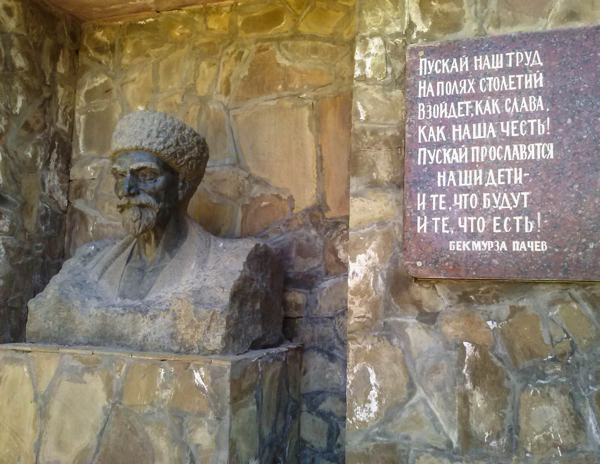 Бюст основоположника кабардинской литературы Бекмурзы Пачева: парк культуры и отдыха, Нальчик, Кабардино-Балкария